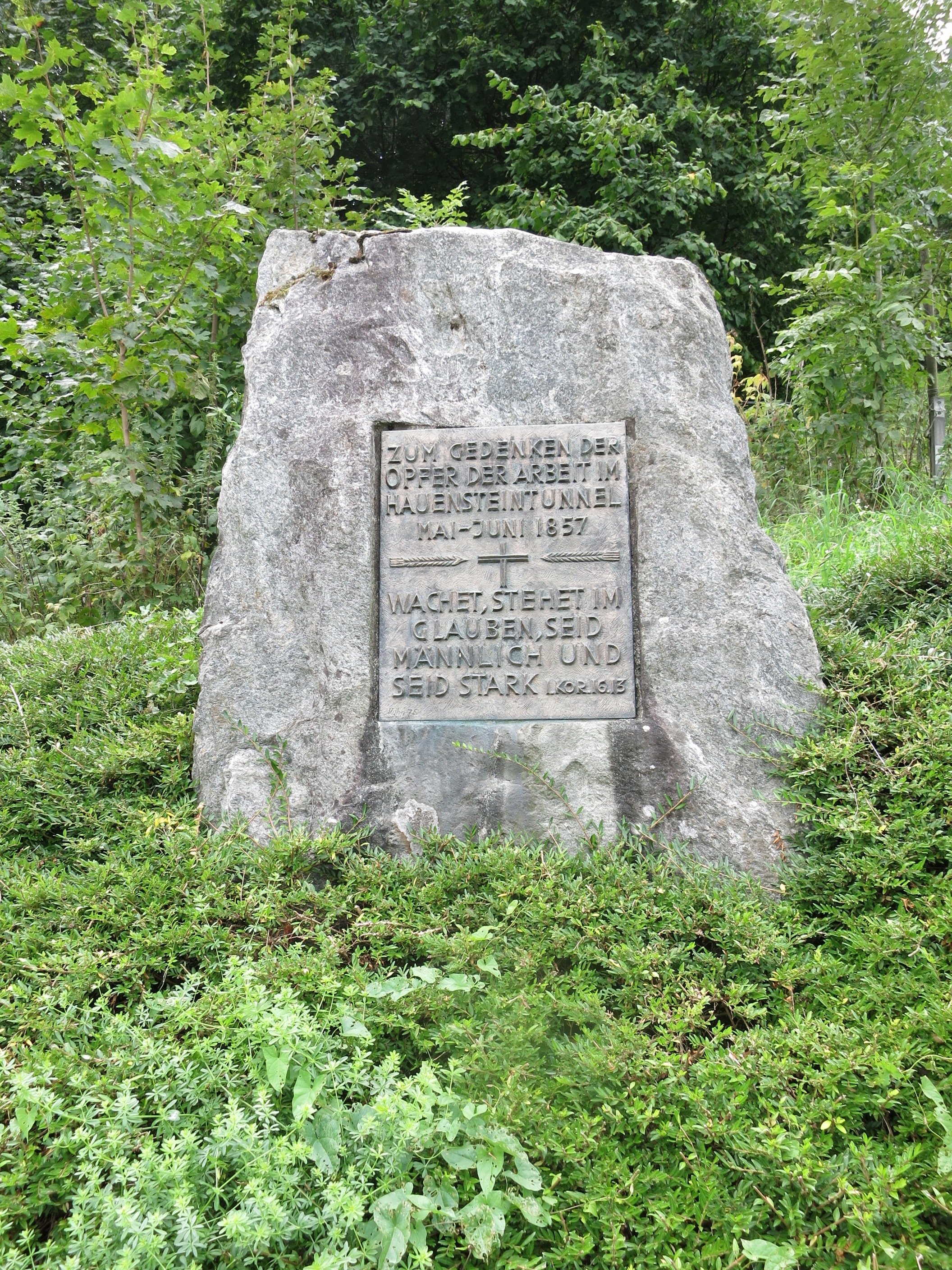 Gedenkstein Hauenstein-Scheiteltunnel, Hauenstein SO, Schweiz